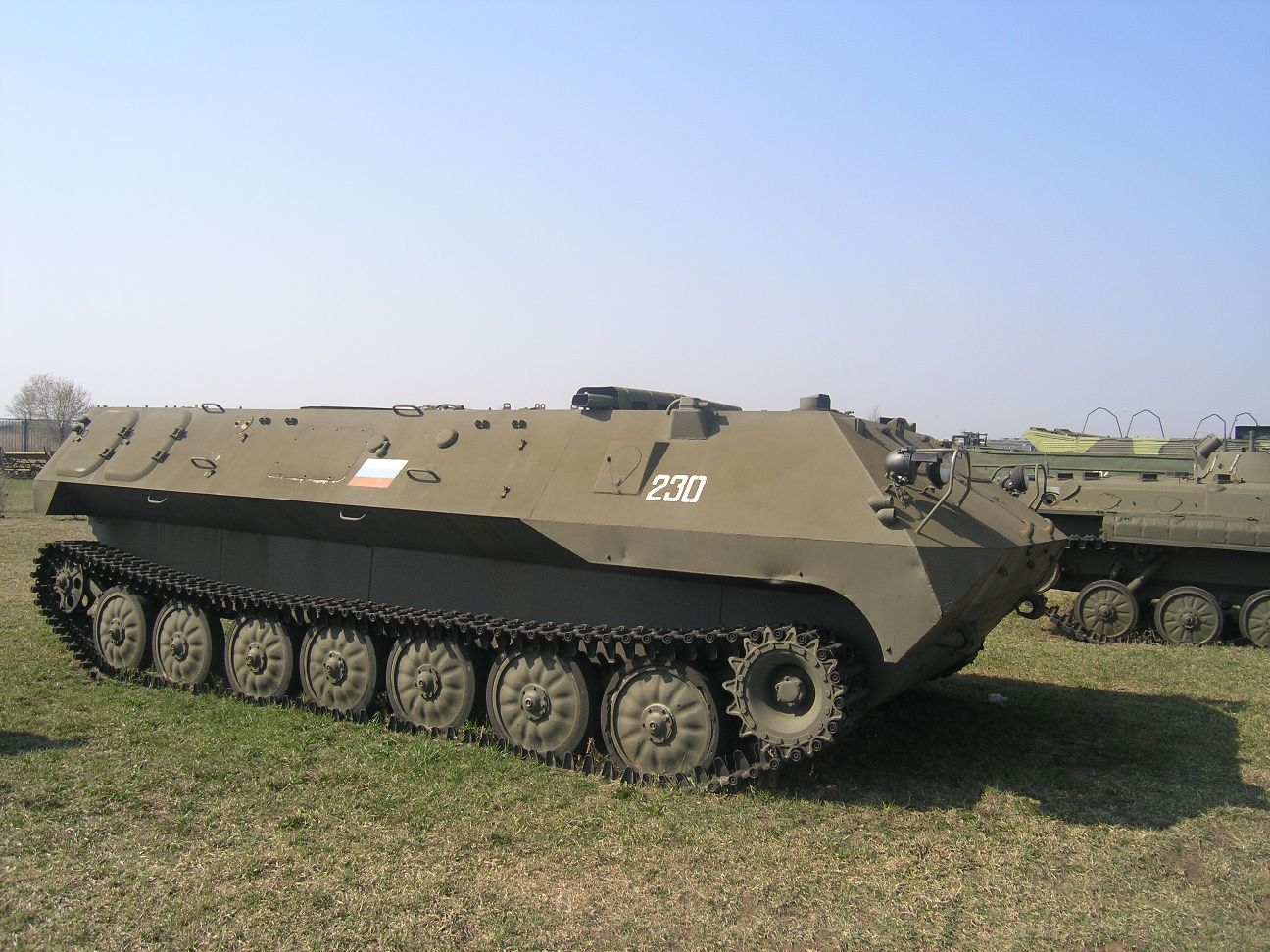 Машина управления на базе бронетранспортёра МТ-ЛБу в Техническом музее Тольятти